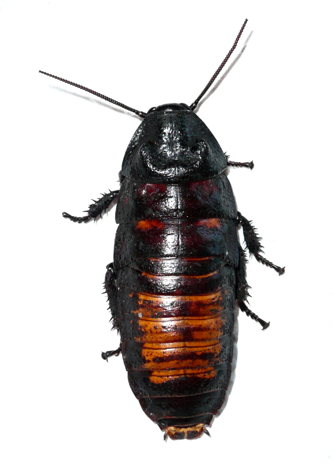 Fauchschabe